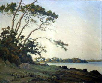 Entrée de l'Anse de Combrit - André Dauchez, 1935